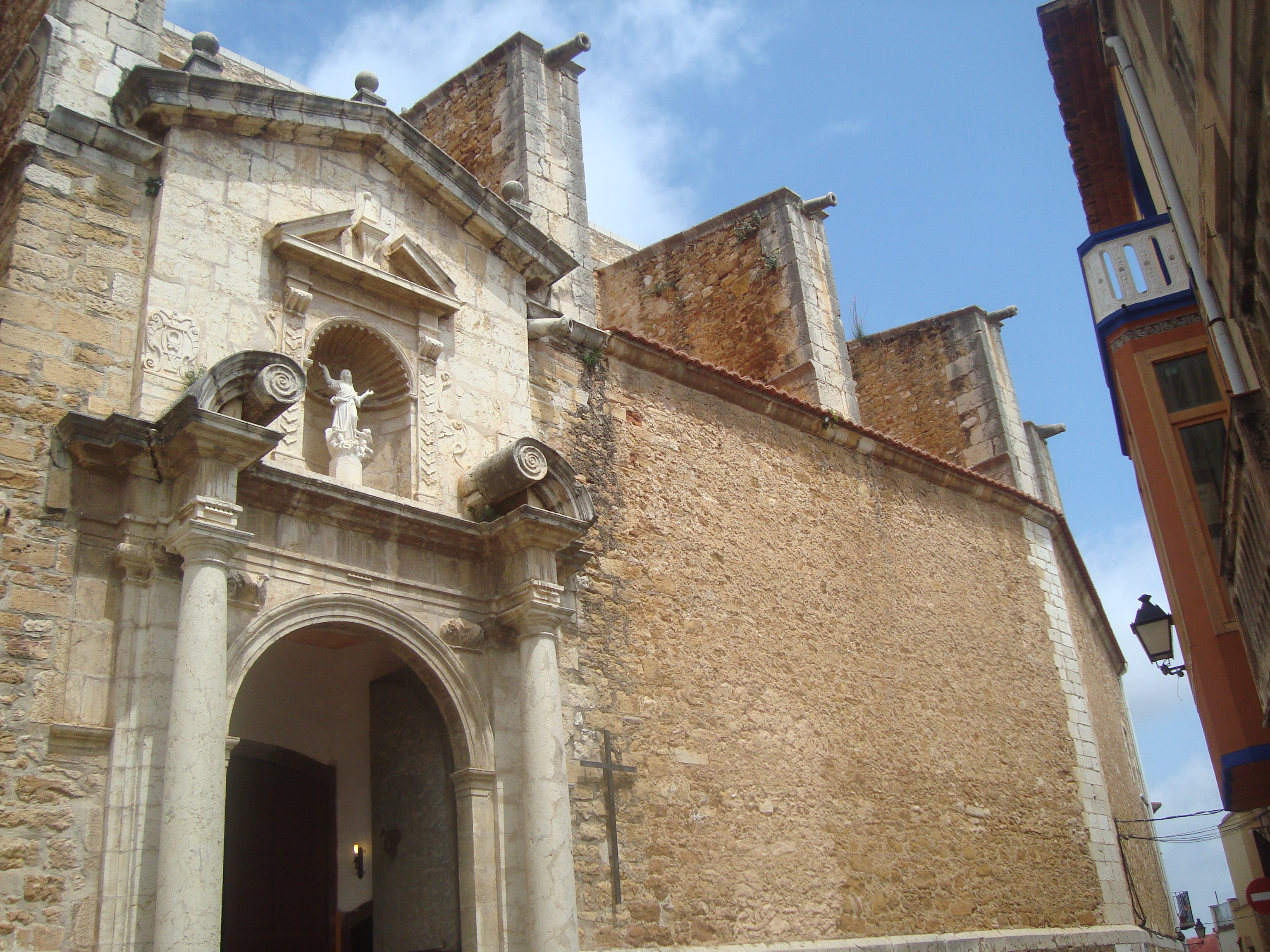 Església parroquial de l'Assumpció (Traiguera) 03.121-001.